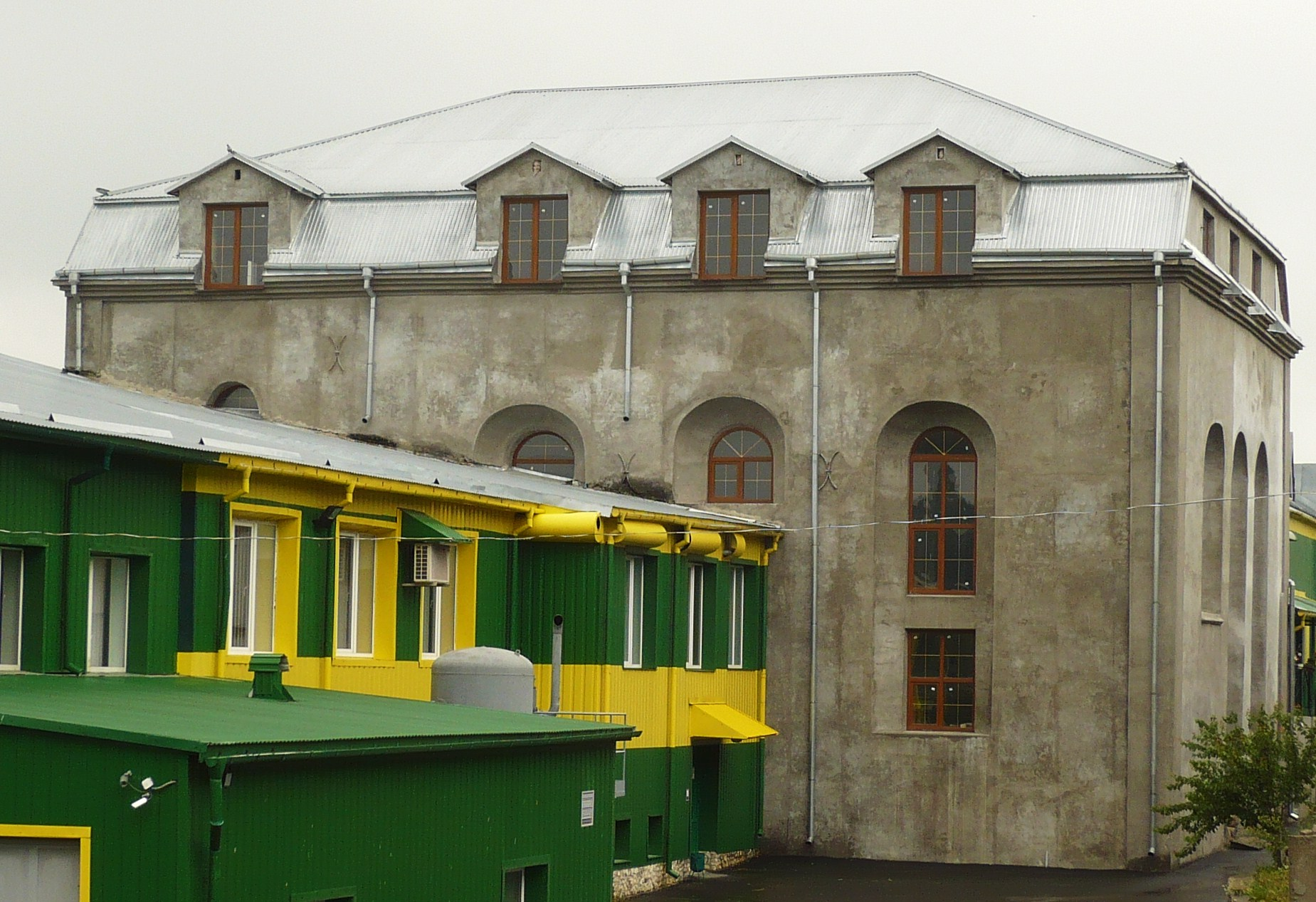 Zbaraż, synagoga